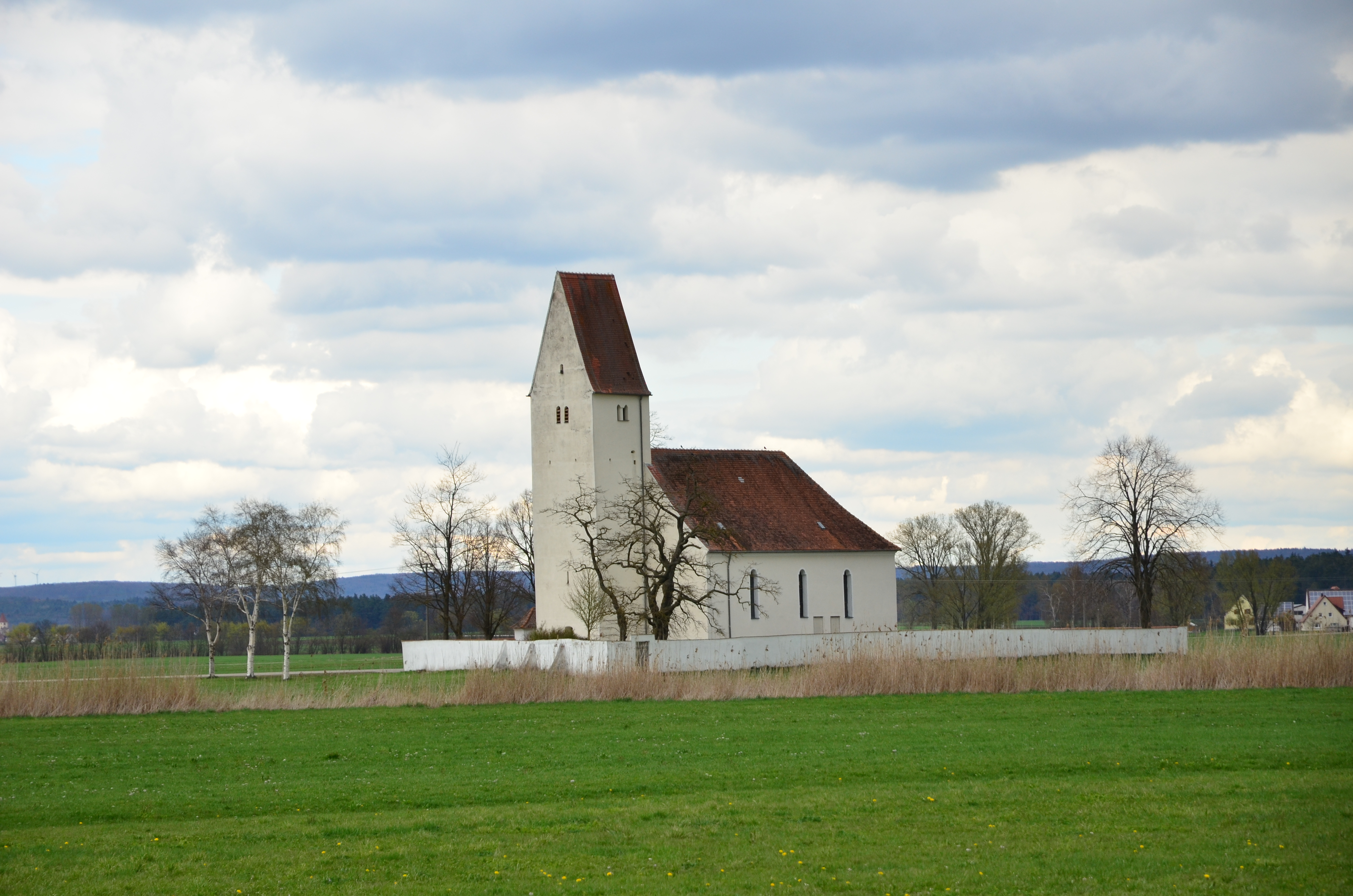 evang.-luth. Kirche St. Peter und Paul von Holzkirchen